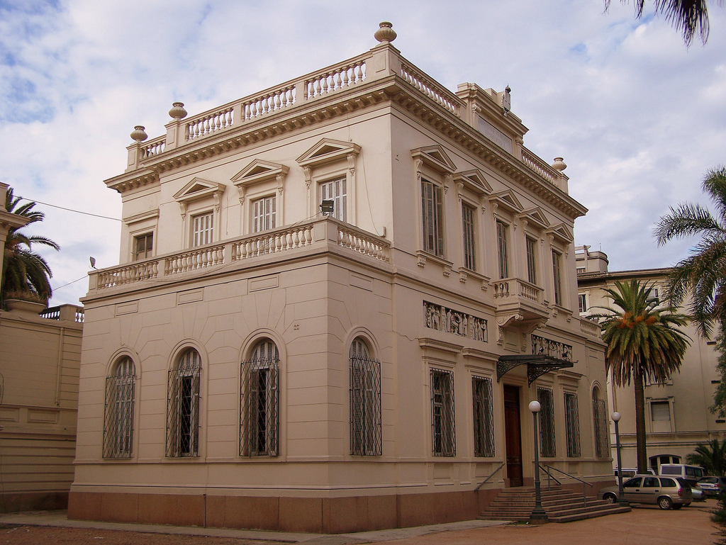 Hospital italiano Humberto I, en Montevideo.